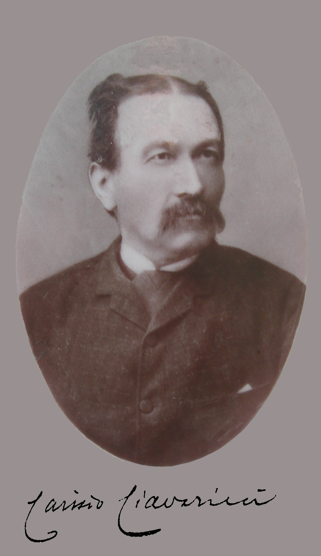 Ritratto di Carisio Ciavarini